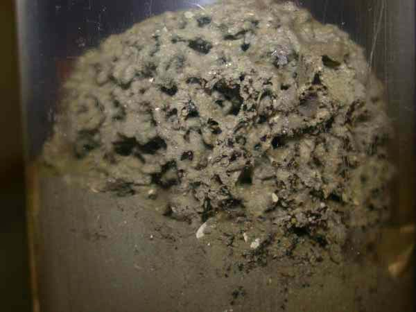 Xenophyophores Xenophyophores, a single-celled organism about the size of a golf ball. Although these unusual organisms are common in the deep sea, this is the first time they have ever been found at a seep site.